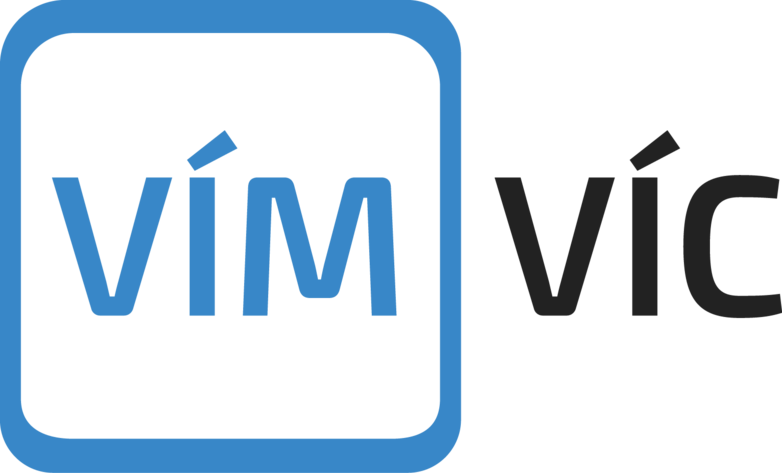 Logo společnosti VímVíc